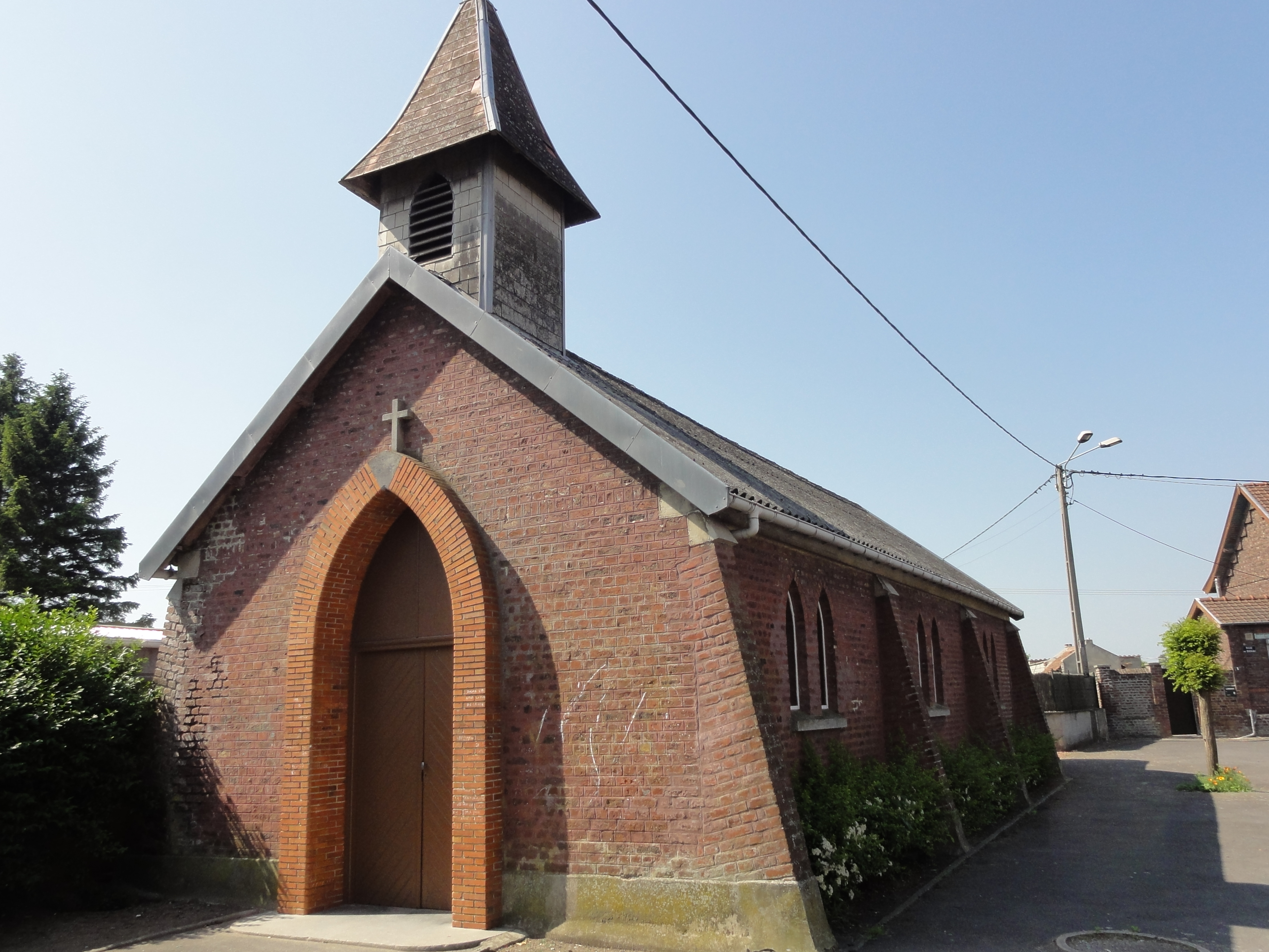 Cités de la Fosse n° 1 de la Compagnie des mines d'Azincourt, Monchecourt, Nord, Nord-Pas-de-Calais, France.